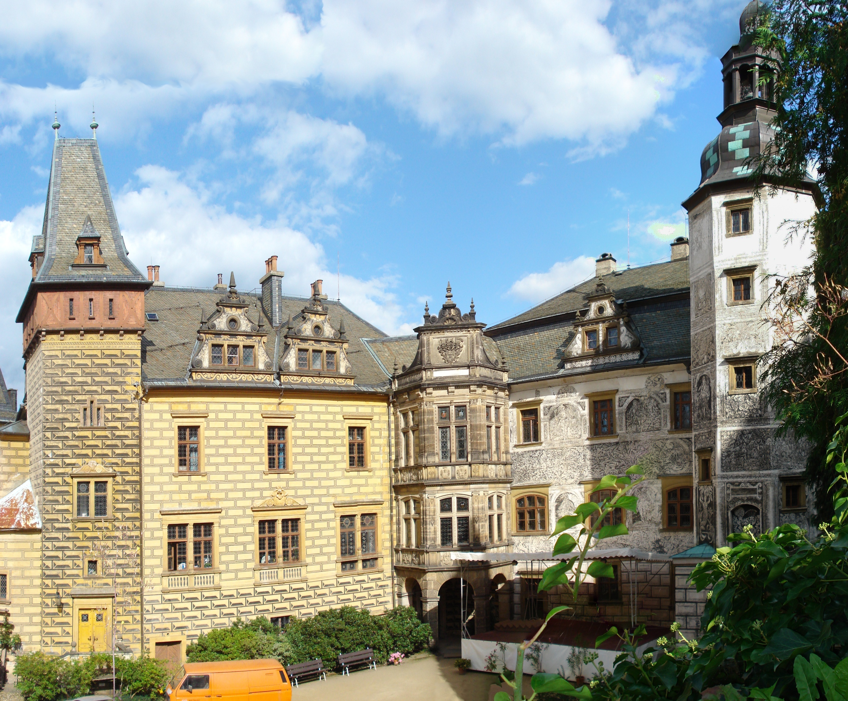 Frýdlant, dziedziniec zamkowy